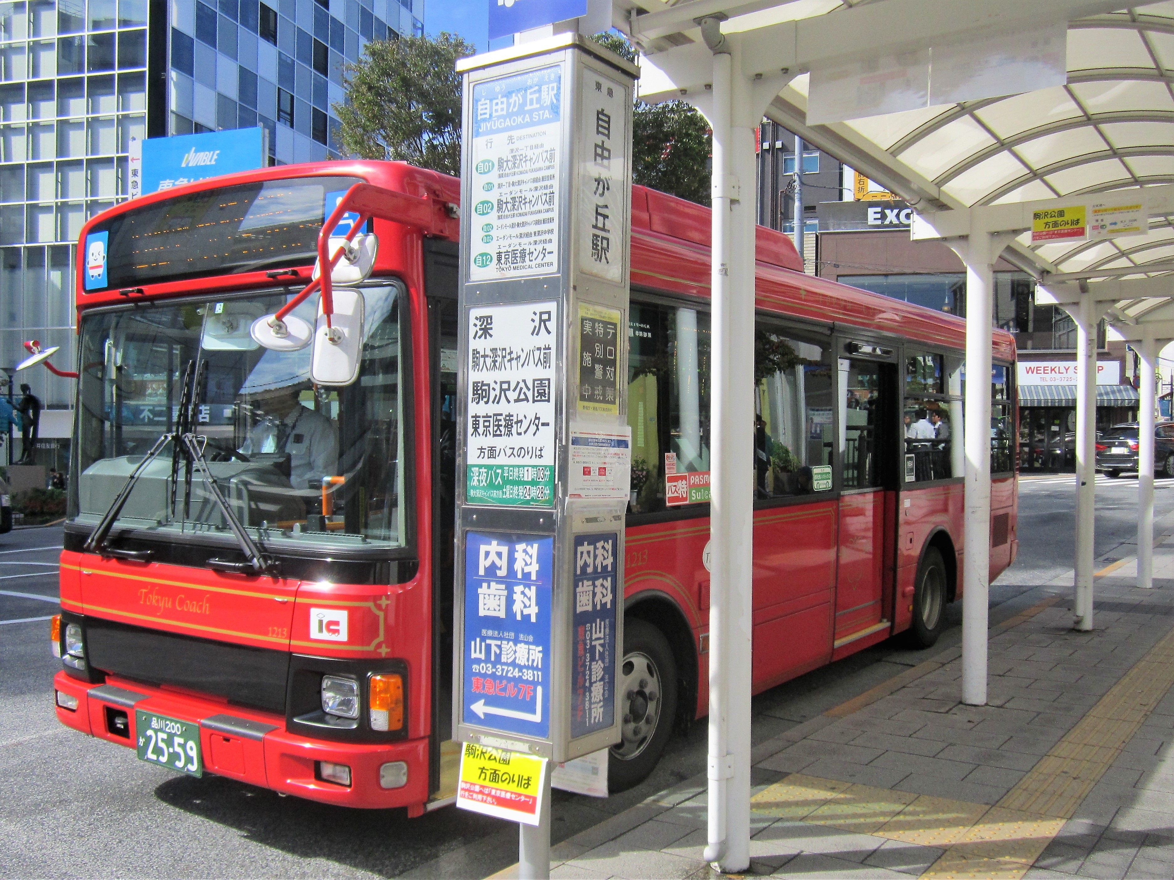 自由が丘駅前に停車中の東急バス・コーチ自由が丘線